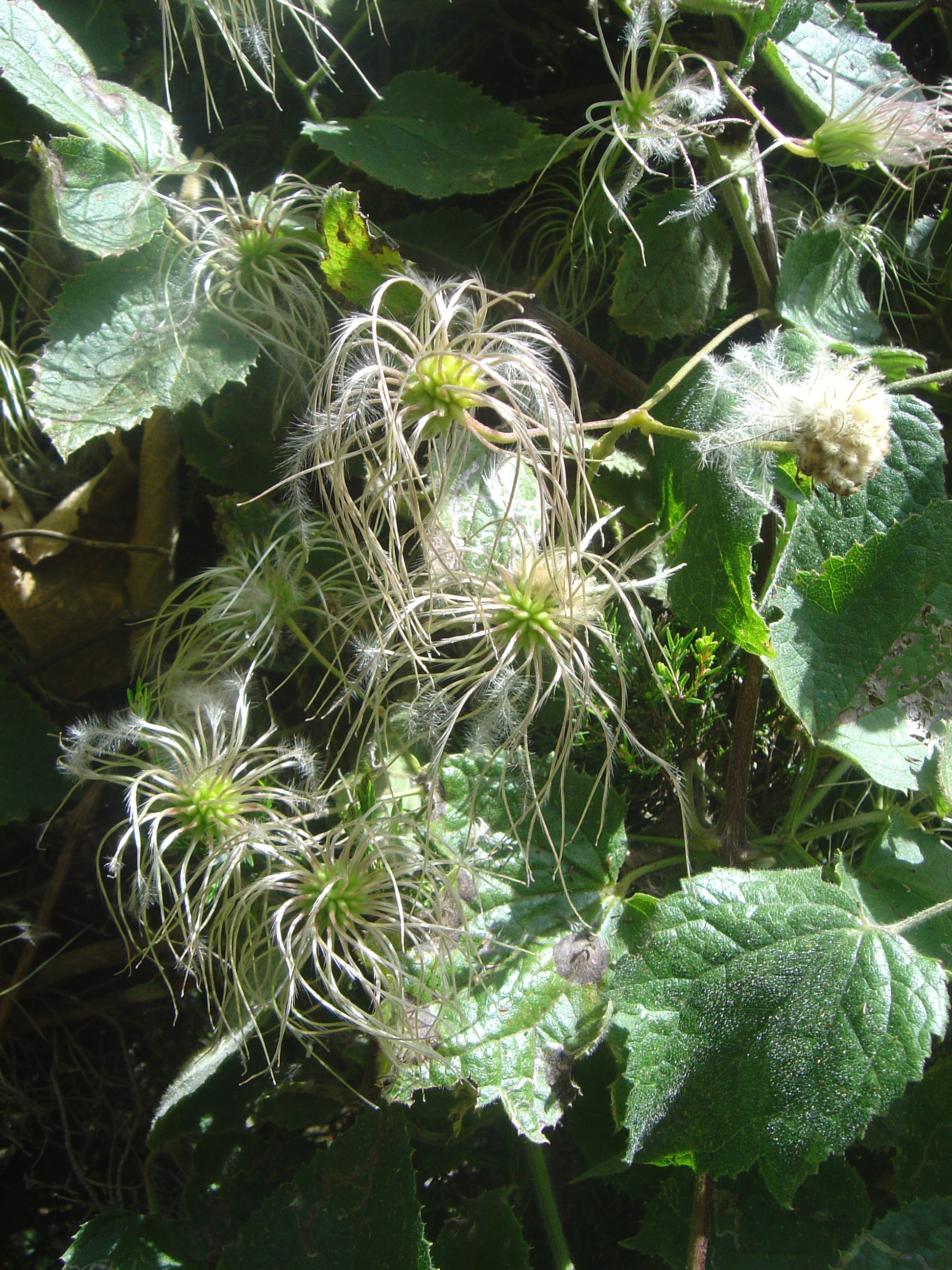 Cirque de Mafate, Réunion Clematis mauritiana (liane mahabit)